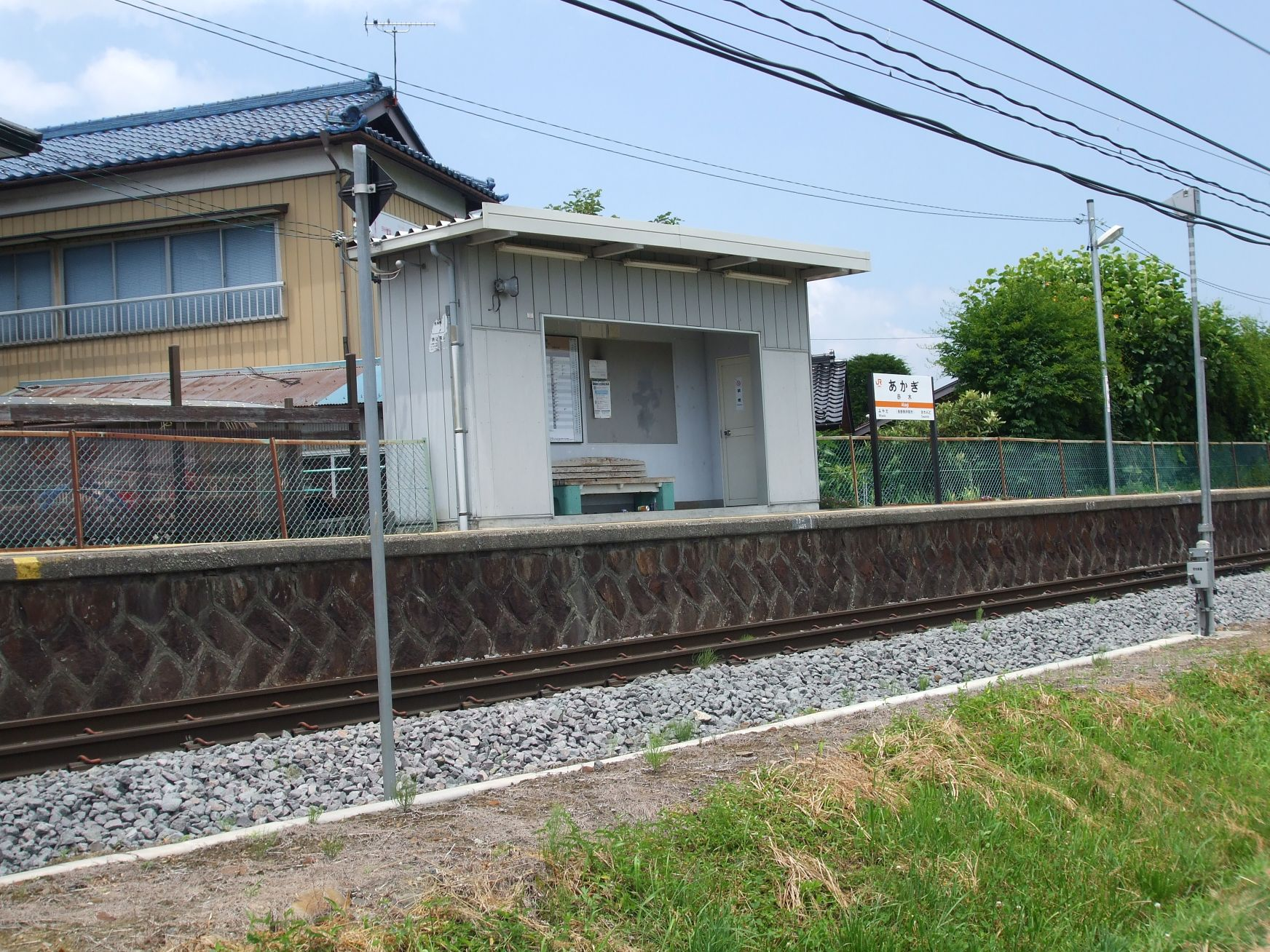 赤木駅 駅名標と待合室